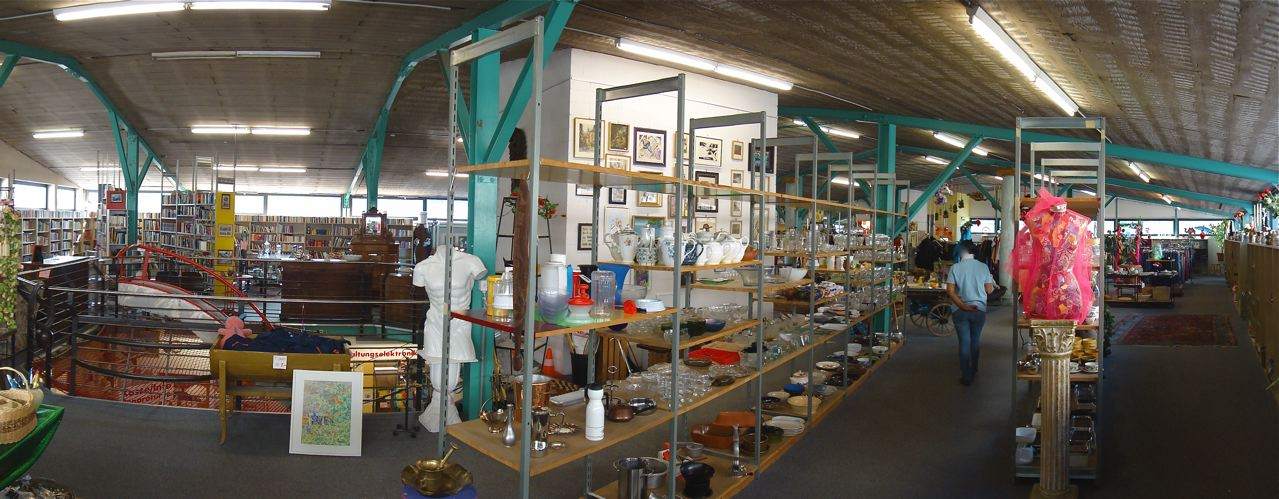 Arche Brockenhaus